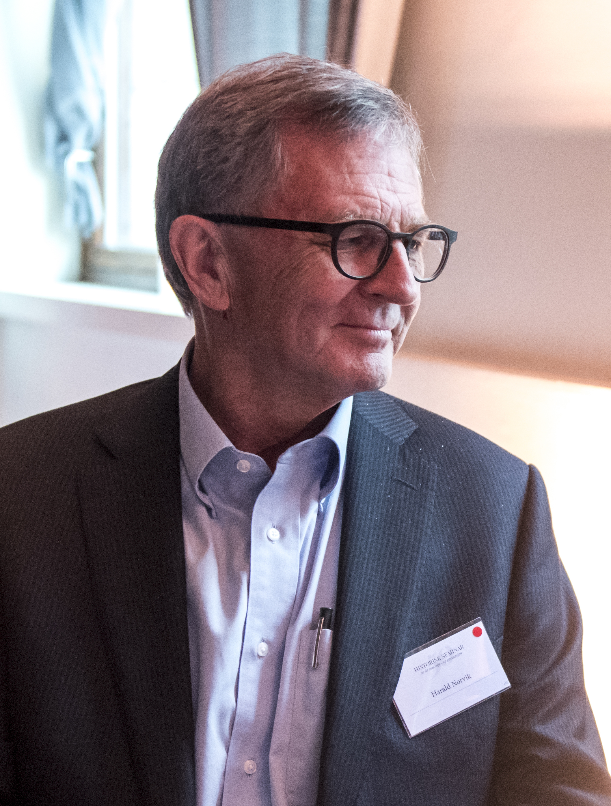 Historisk seminar 3. november 2016 i Ballroom i Oslo. Foto: Olav Standal Tange, Norsk olje og gass